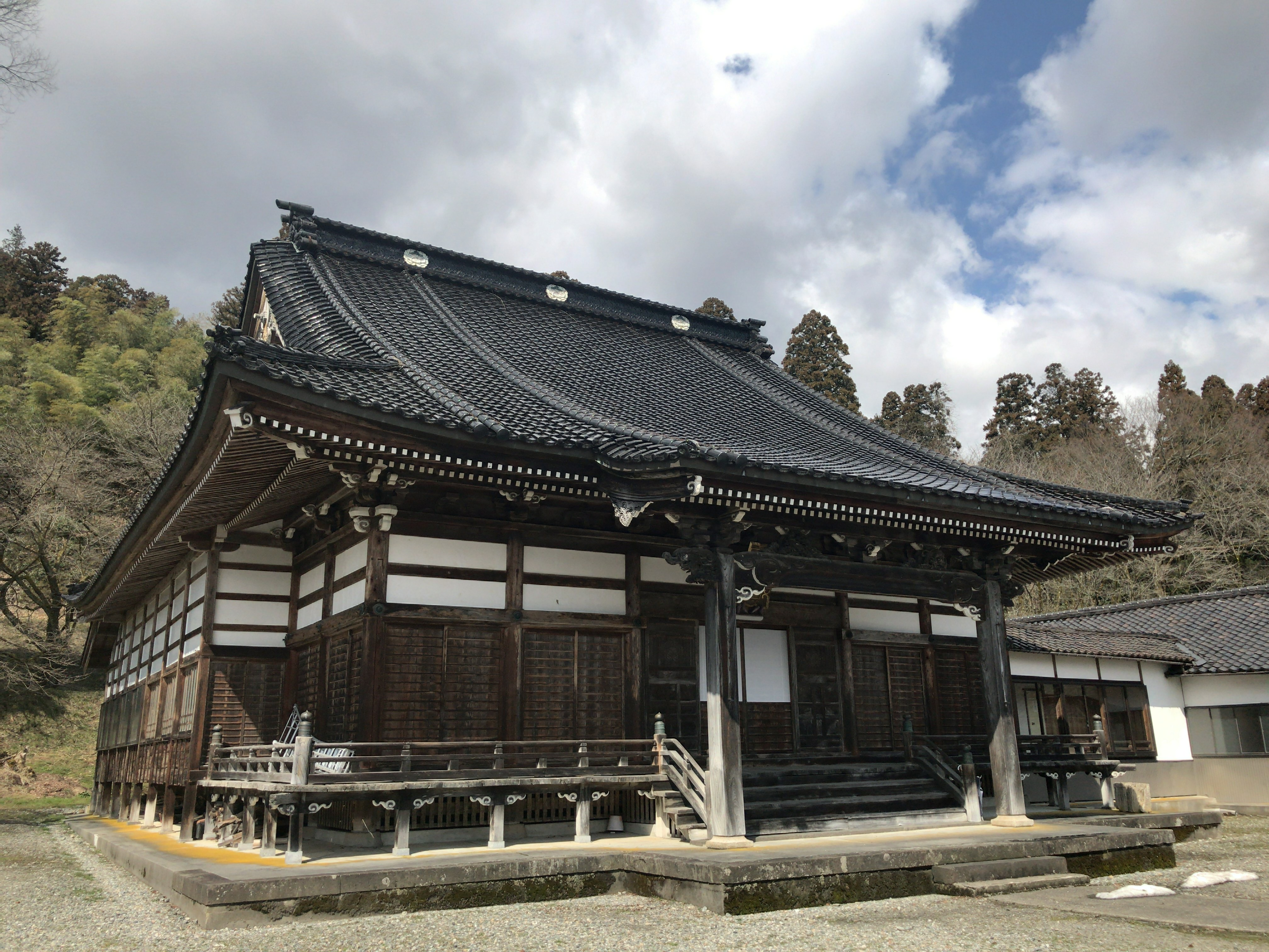 本覚寺本堂（全景）